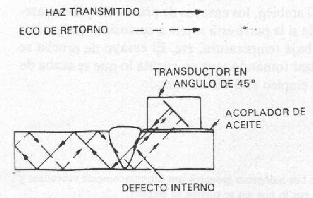 Recorrido de ondas sonoras a través de un material que permite la detección de fallos en material por principio ultrasónico